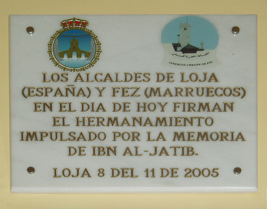 Placa en el ayuntamiento de Loja, Granada, con motivo del hermanamiento de esta localidad con Fez, Marruecos.